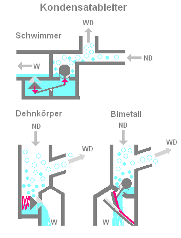 gezeichnet